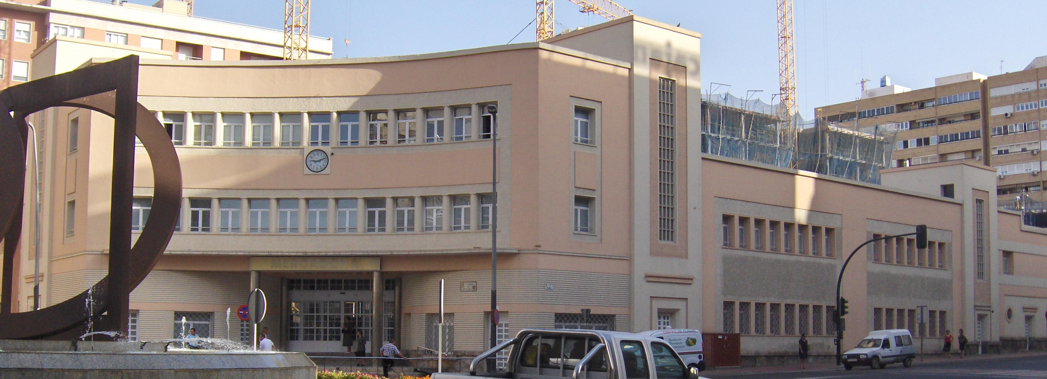 Antigua estación de autobuses de Almería, hoy ocupada por un supermercado.